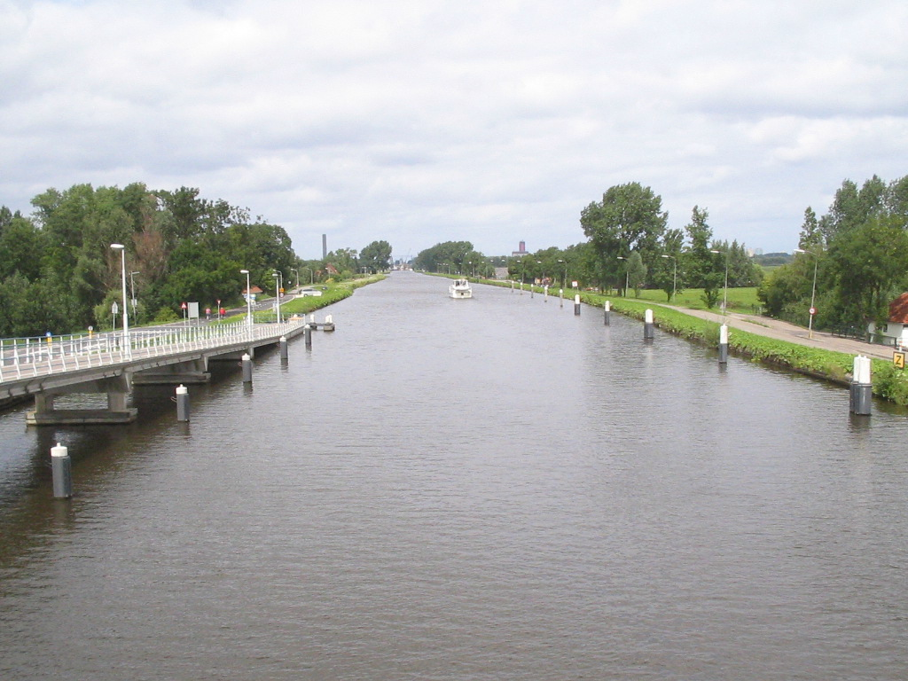 Delftse Schie gezien vanaf Kandelaarbrug